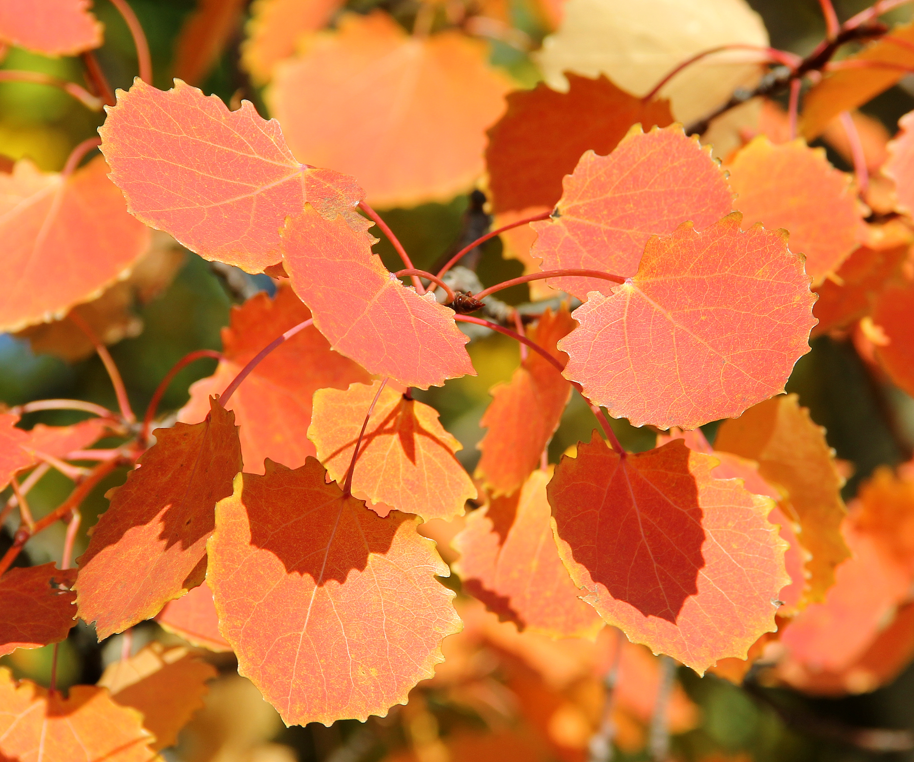 Populus tremula Осина осенью Листья красные